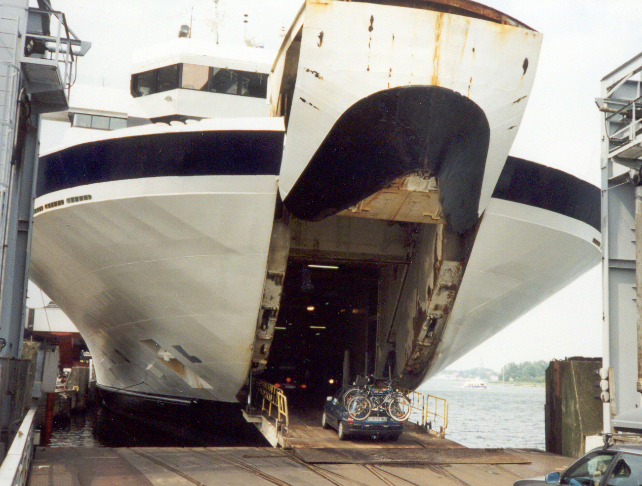 Finnjet